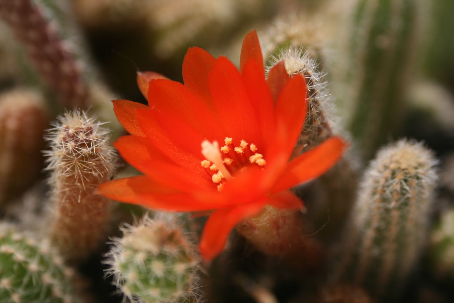 Echinopsis chamaecereus (Lobivia sylvestrii) (Trichocereeae; Cactaceae; Planta)